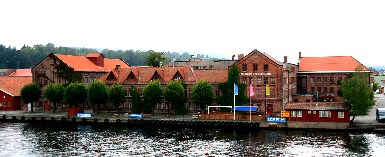 Porsgrunn porselensfabrikk. Architect: Waldemar Hansteen (1857–1921).